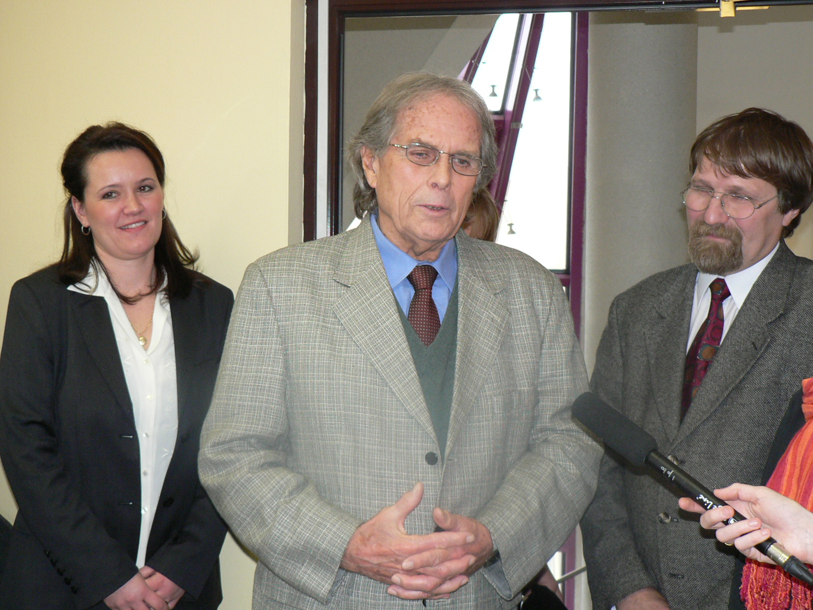 Görgey Gábor egy solymári magánrendelő megnyitóján